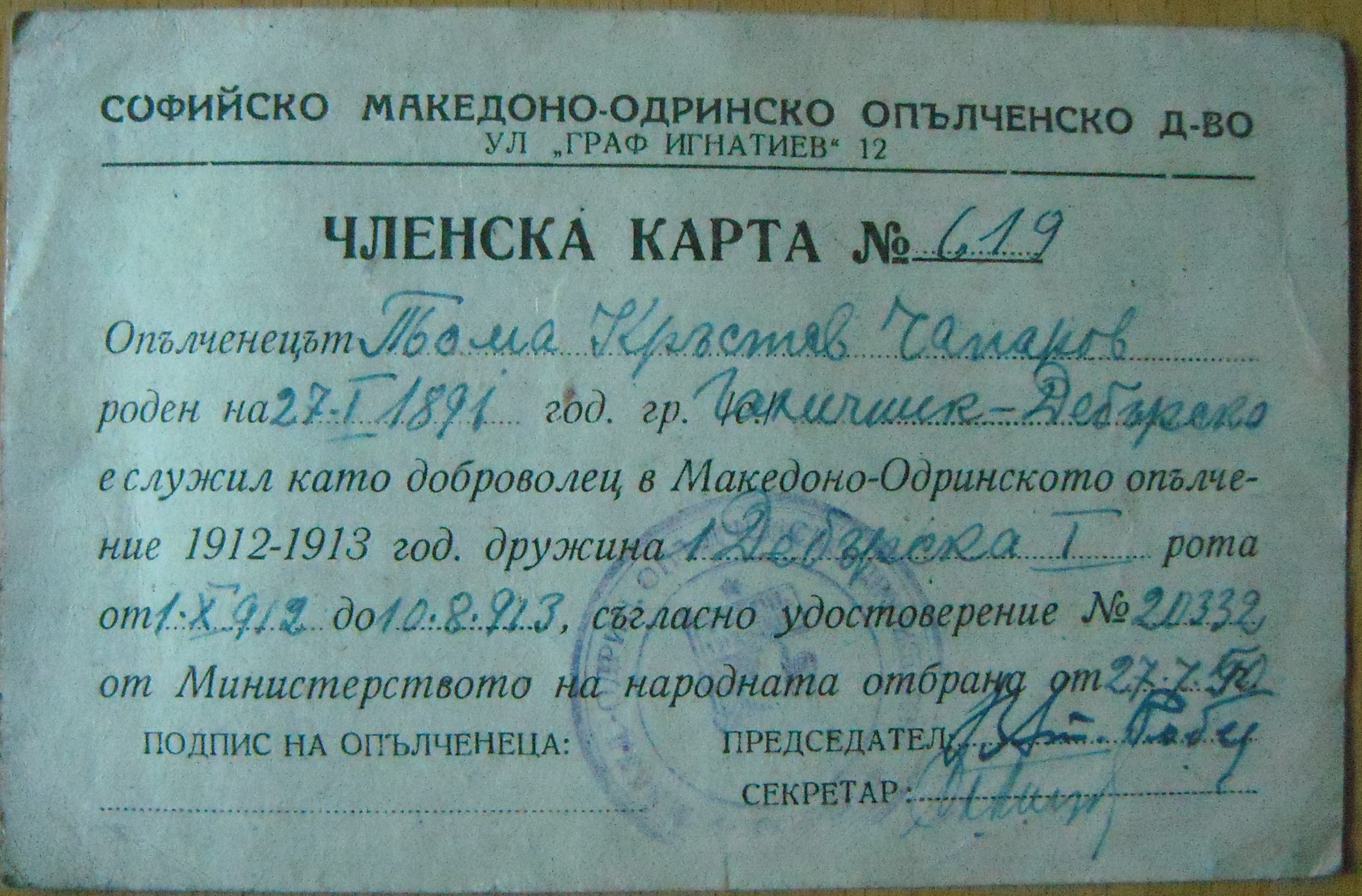 Членска карта на софийското дружество на Съюза на македоно-одринските опълченски дружества на Тома Кръстев Чапаров от Галичник.